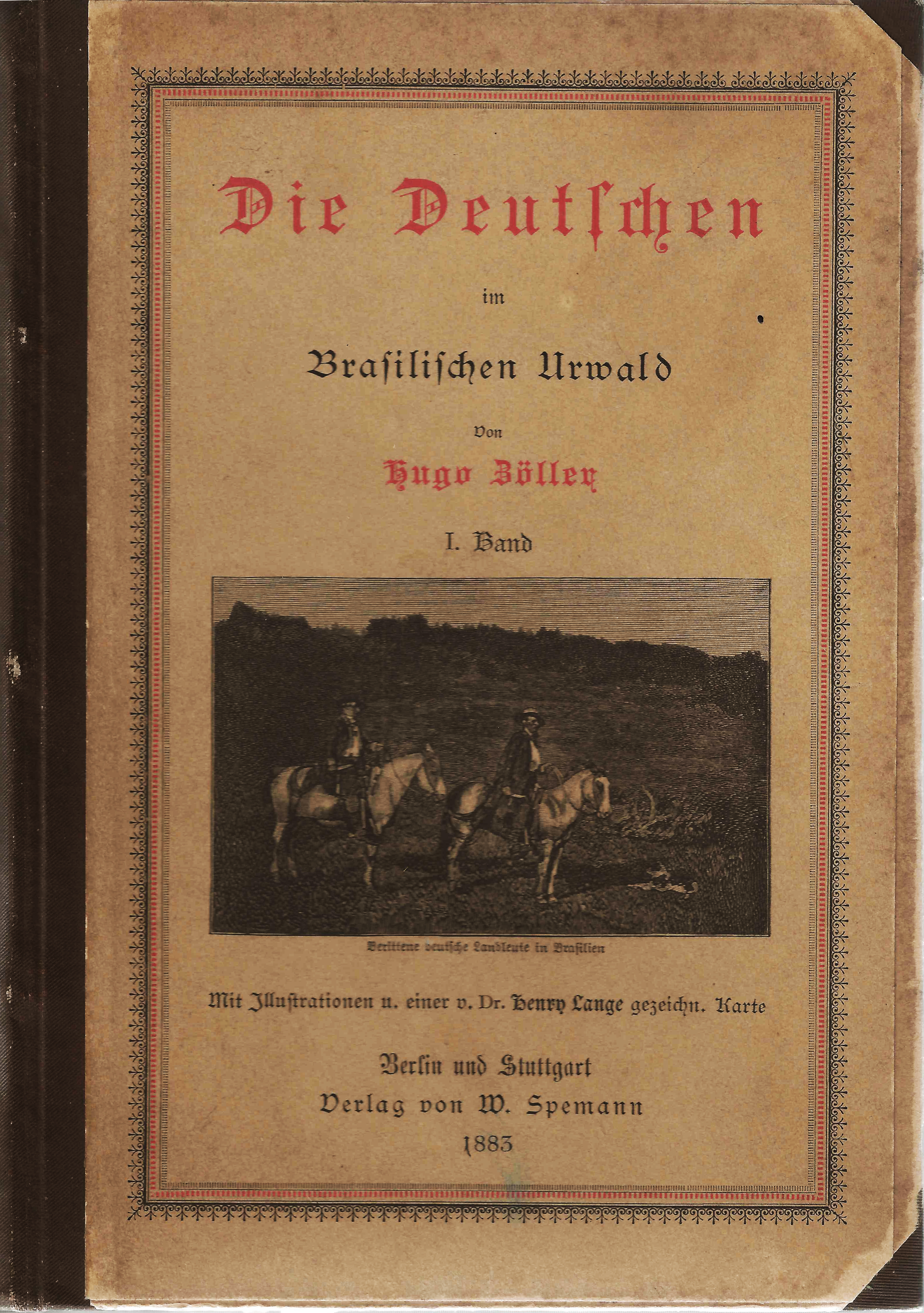 Bucheinband von "Die Deutschen im Brasilischen Urwald von Hugo Zöller - I. Band Verlag von W. Spemann Illustrationen und einer von Dr. Henry Lange gezeichnete Karte